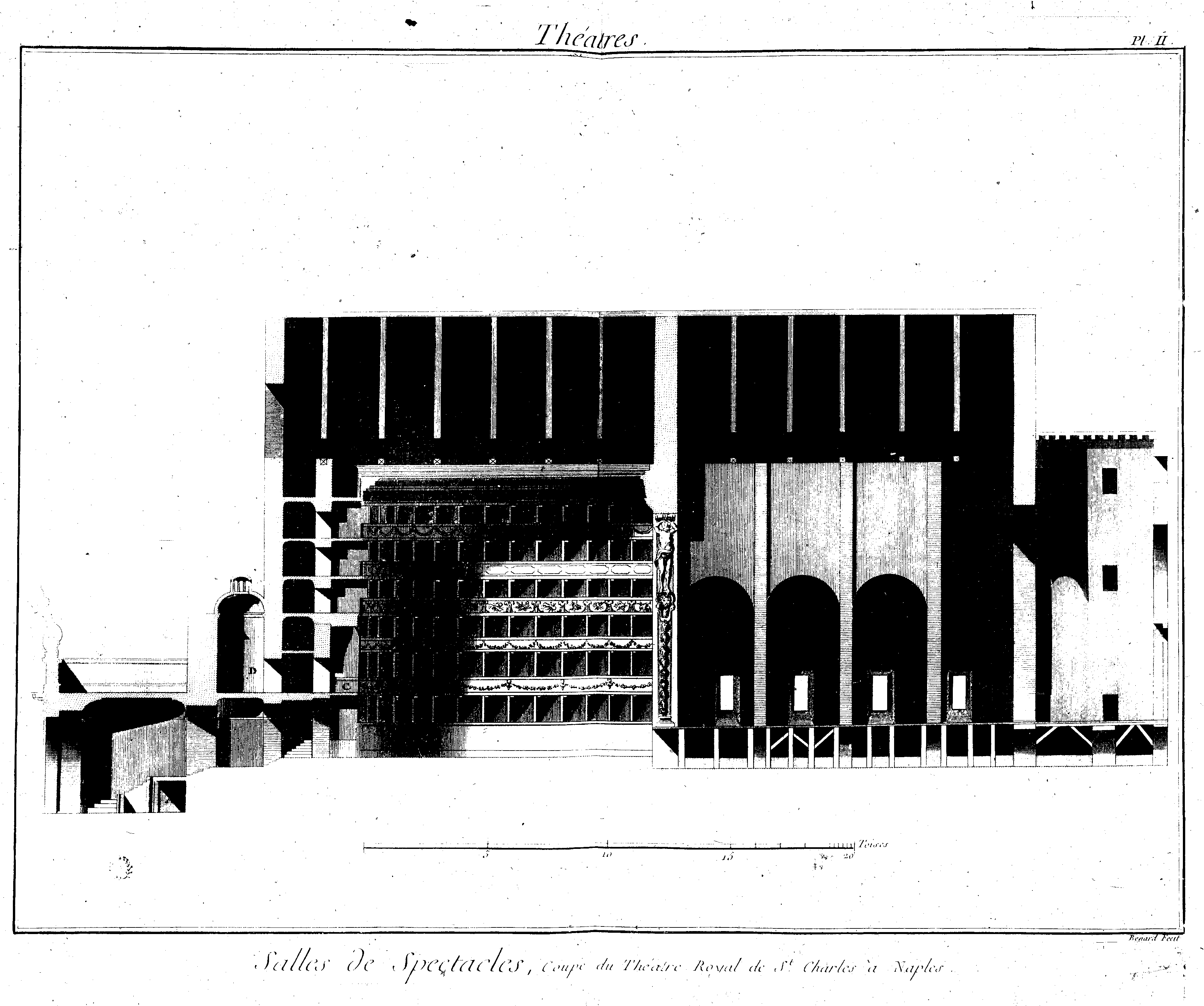 Planches de l'Encyclopédie de Diderot et d'Alembert, volume 9